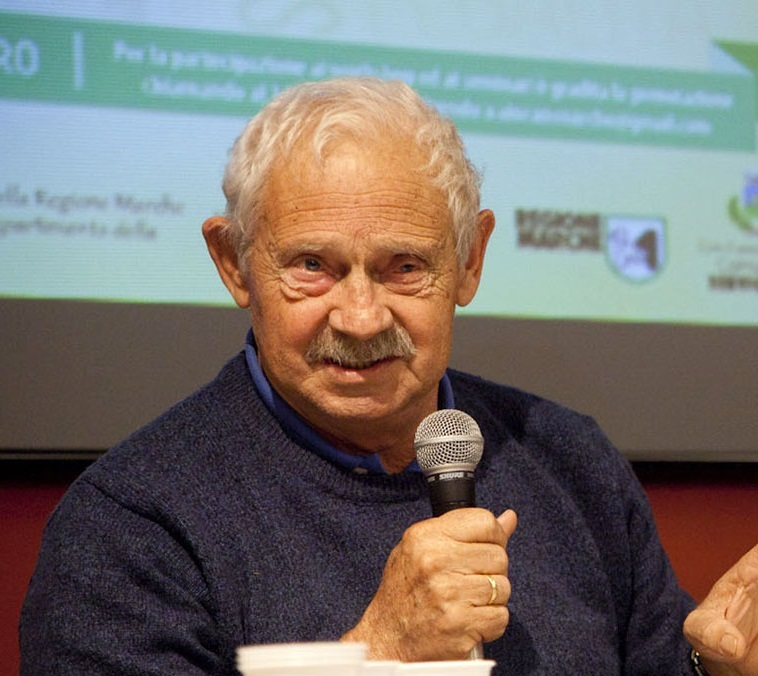 Salvo Vitale alla Giornata della Legalità e della Mondialità di Servigliano (Fermo)